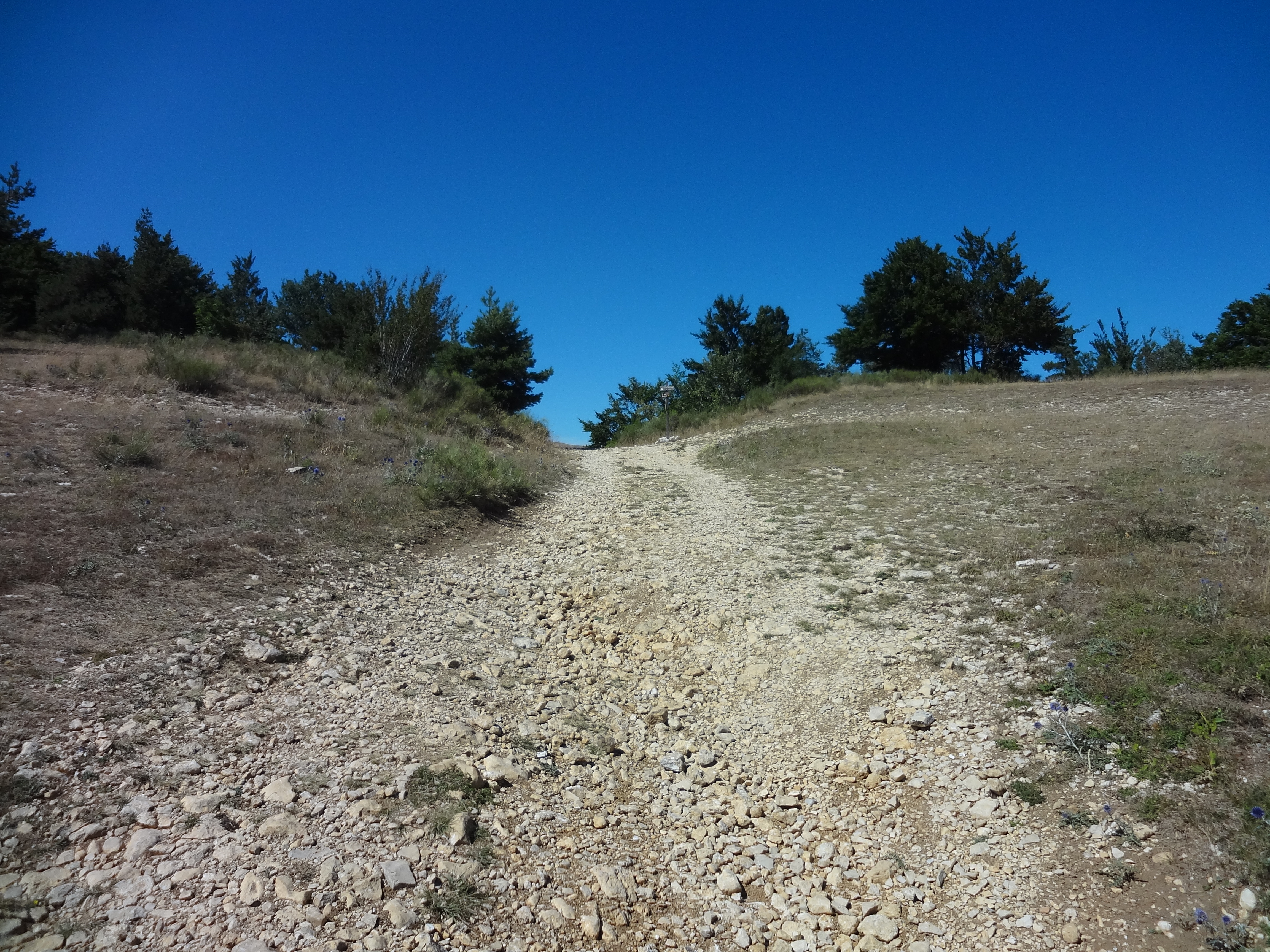 pas de redortiers vu du sud